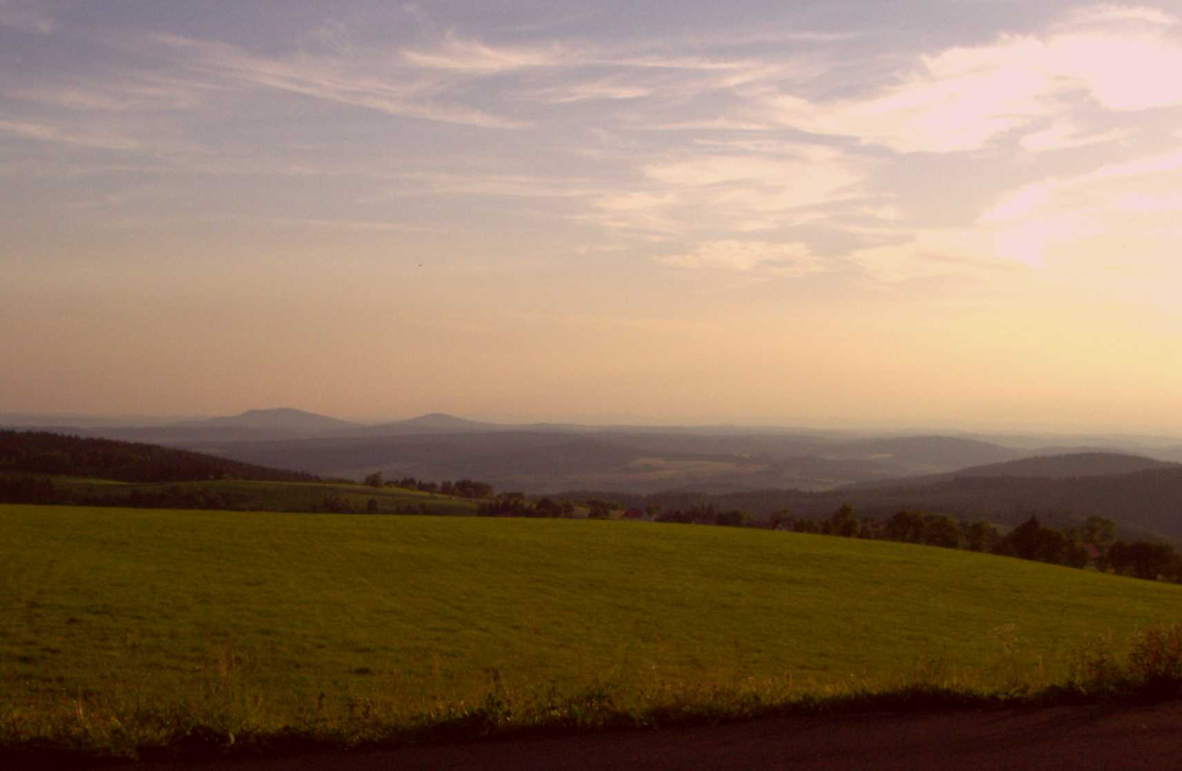 Großer (679m) und kleiner (641m) Gleichberg vom Eckartsberg bei Waffenrod-Hinterrod (760m, Thüringer Wald) aus; ganz links der Klingeberg (677m), ganz rechts der Priemäusel (625m), links dahinter der Solaberg (577m); Thüringen, Deutschland